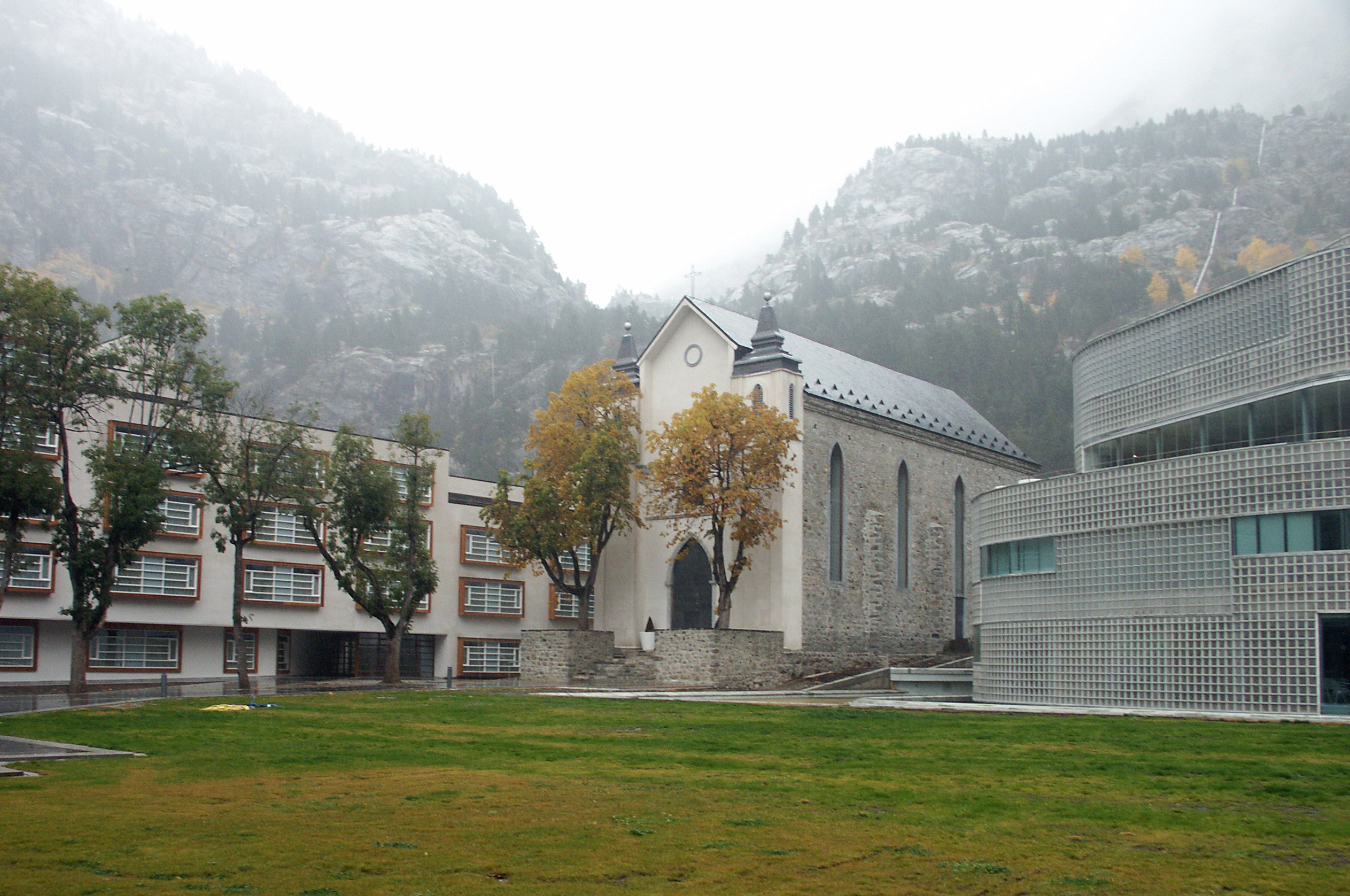 Balneario de Panticosa (Huesca, España) en invierno. Iglesia antigua rodeada por los nuevos edificios del balneario.